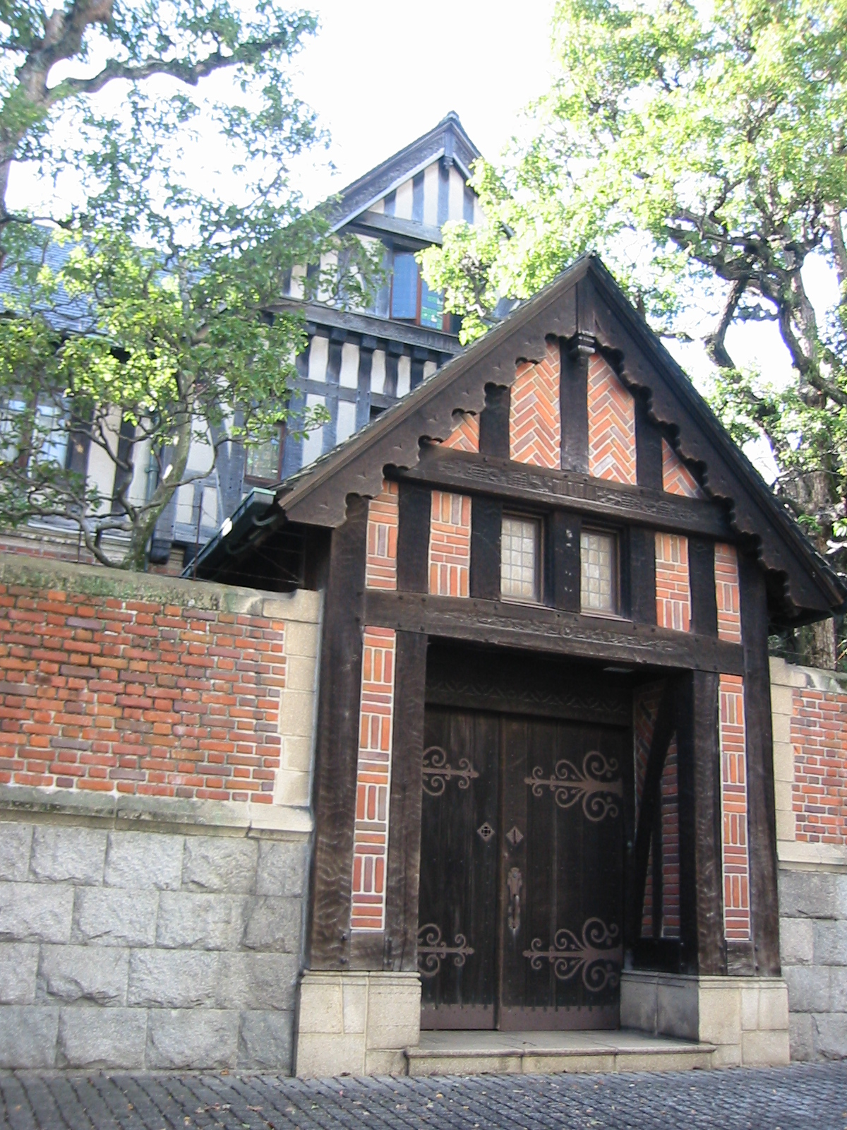 神戸 木材商の室谷藤七邸(1934) 須磨離宮公園向かいウィリアム・メレル・ヴォーリズ設計